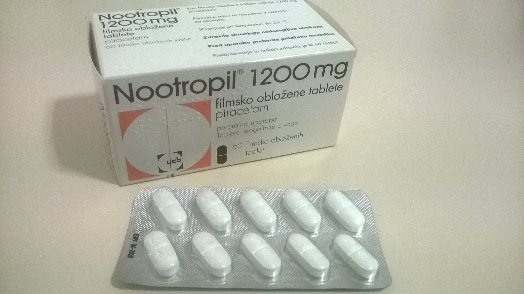 Nootropil 1200 mg filmsko obložene tablete, ki vsebujejo piracetam.